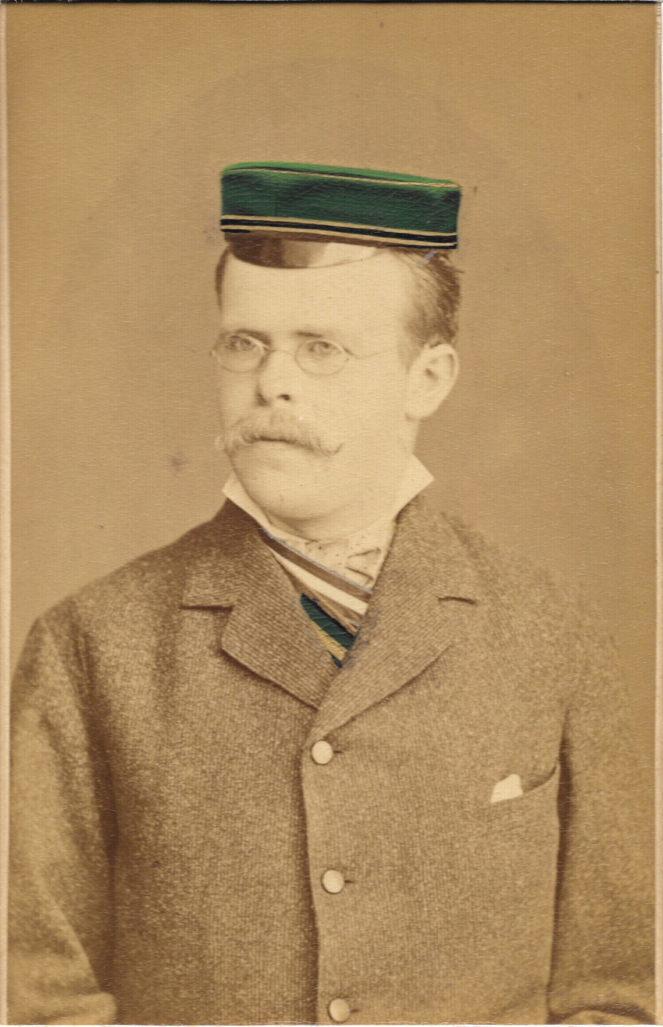 Otto Snell Porträt des Corps Teutonia-Hercynia